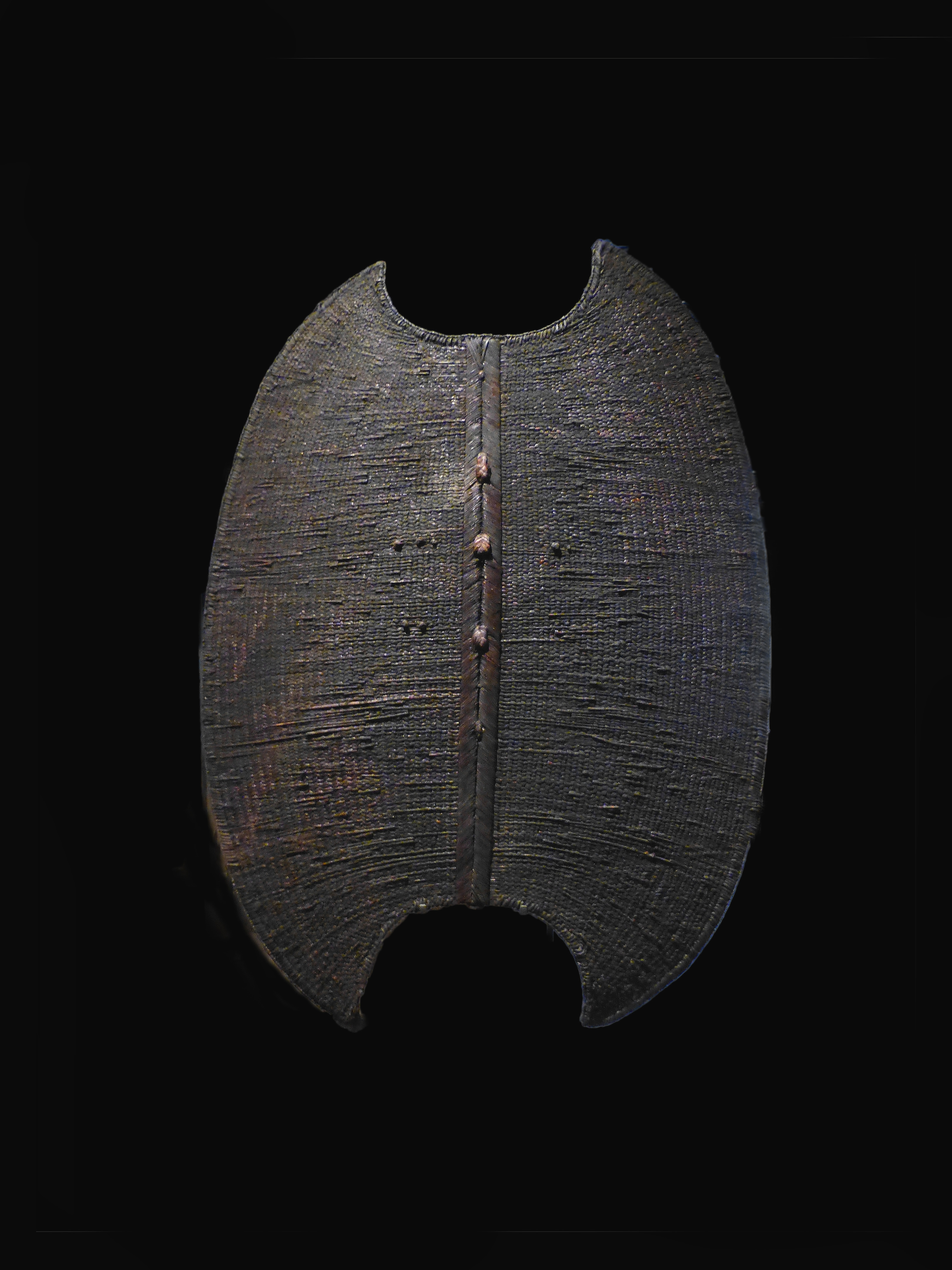 Bouclier. Nigeria ou Cameroun. Population Mambila. XXe siècle. Fibres végétales, bois. Lyon. Musée des Confluences. Inv. n° 2001.15.5